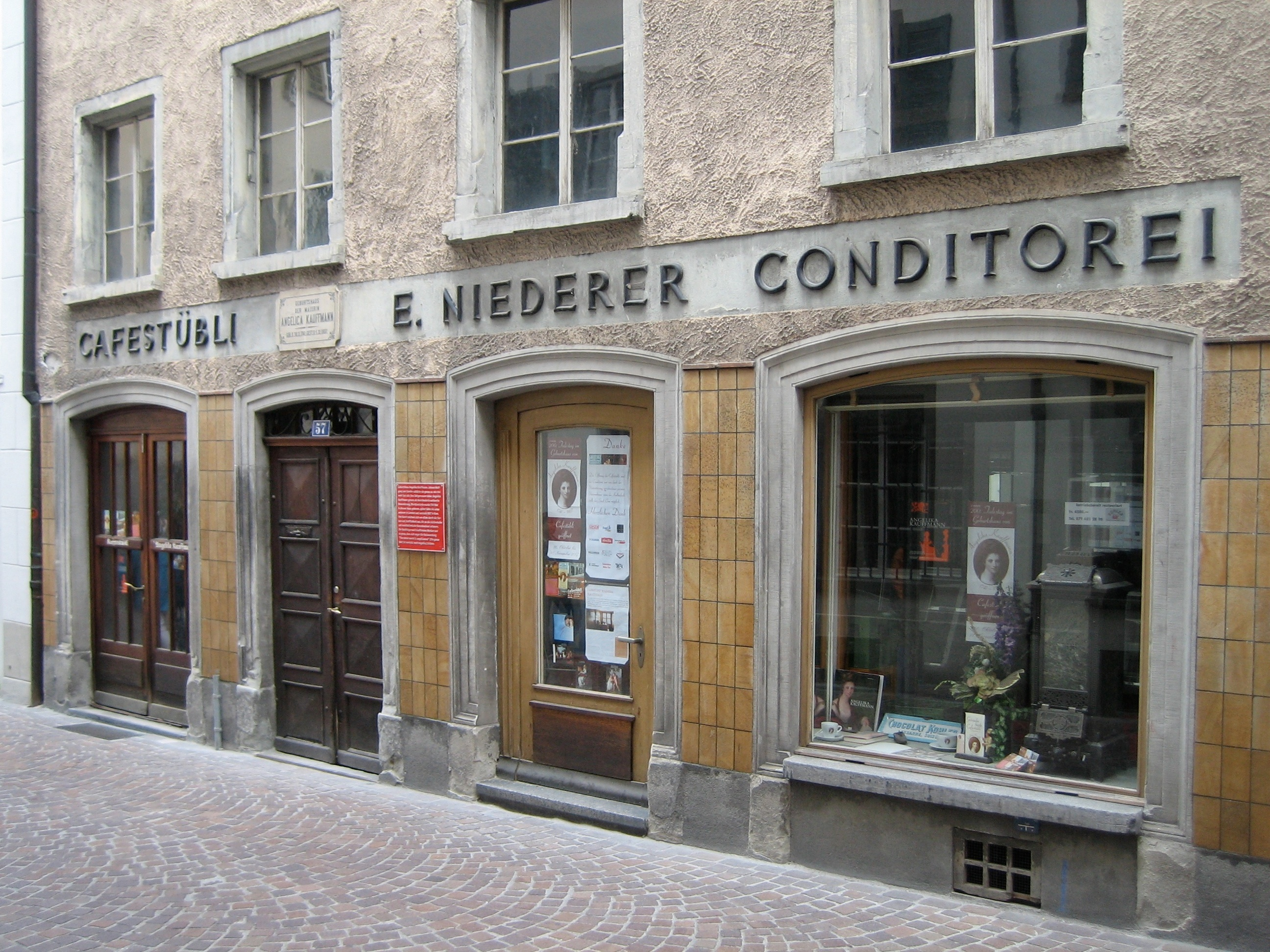 Geburtshaus von Angelika Kauffmann in Chur